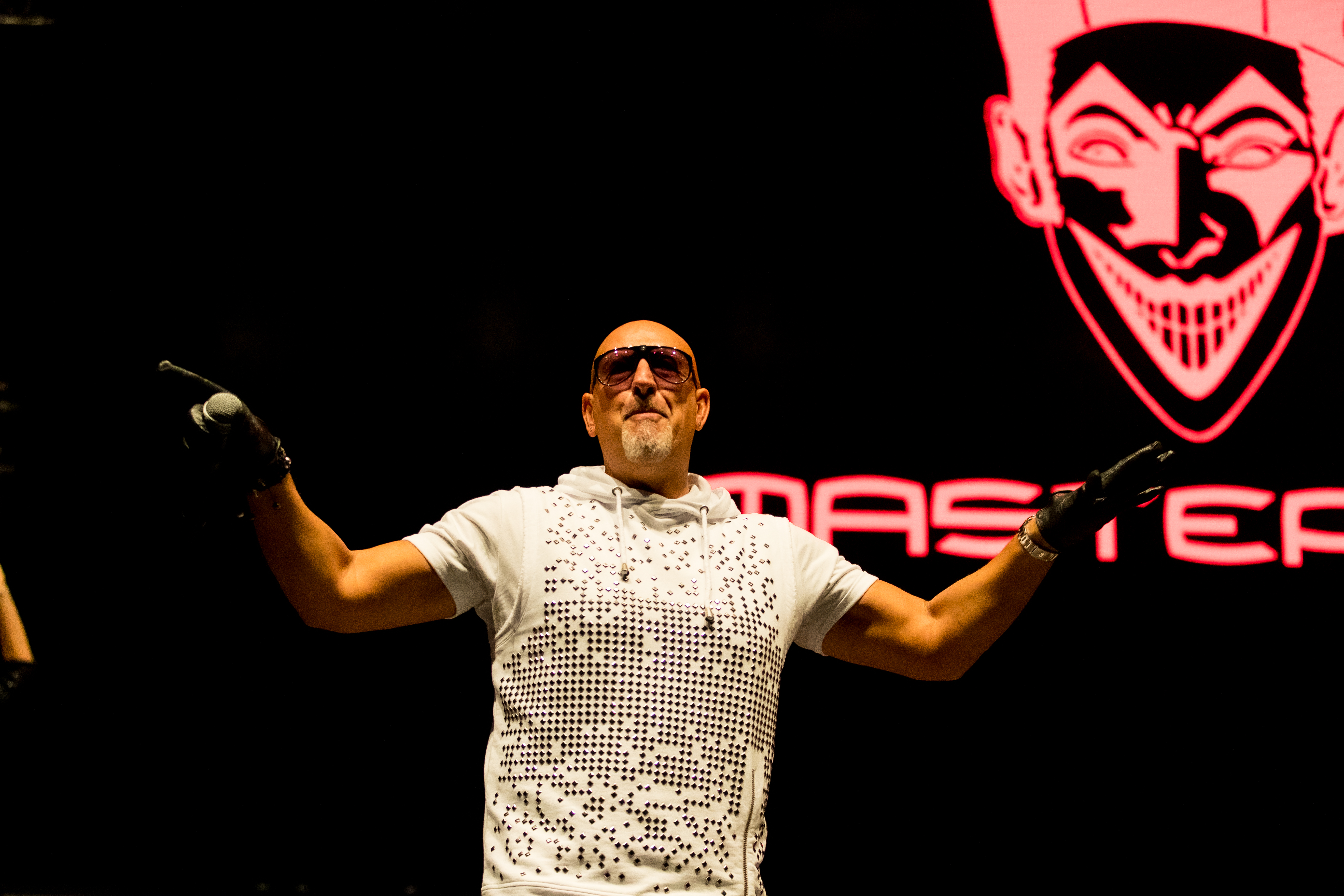 Masterboy & Beatrix Delgado during Sunshine Live - Die 90er Live on Stage at Maimarkthalle & Maimarktclub, Mannheim, Baden-Württemberg, Germany on 2019-11-30, Photo: Sven Mandel